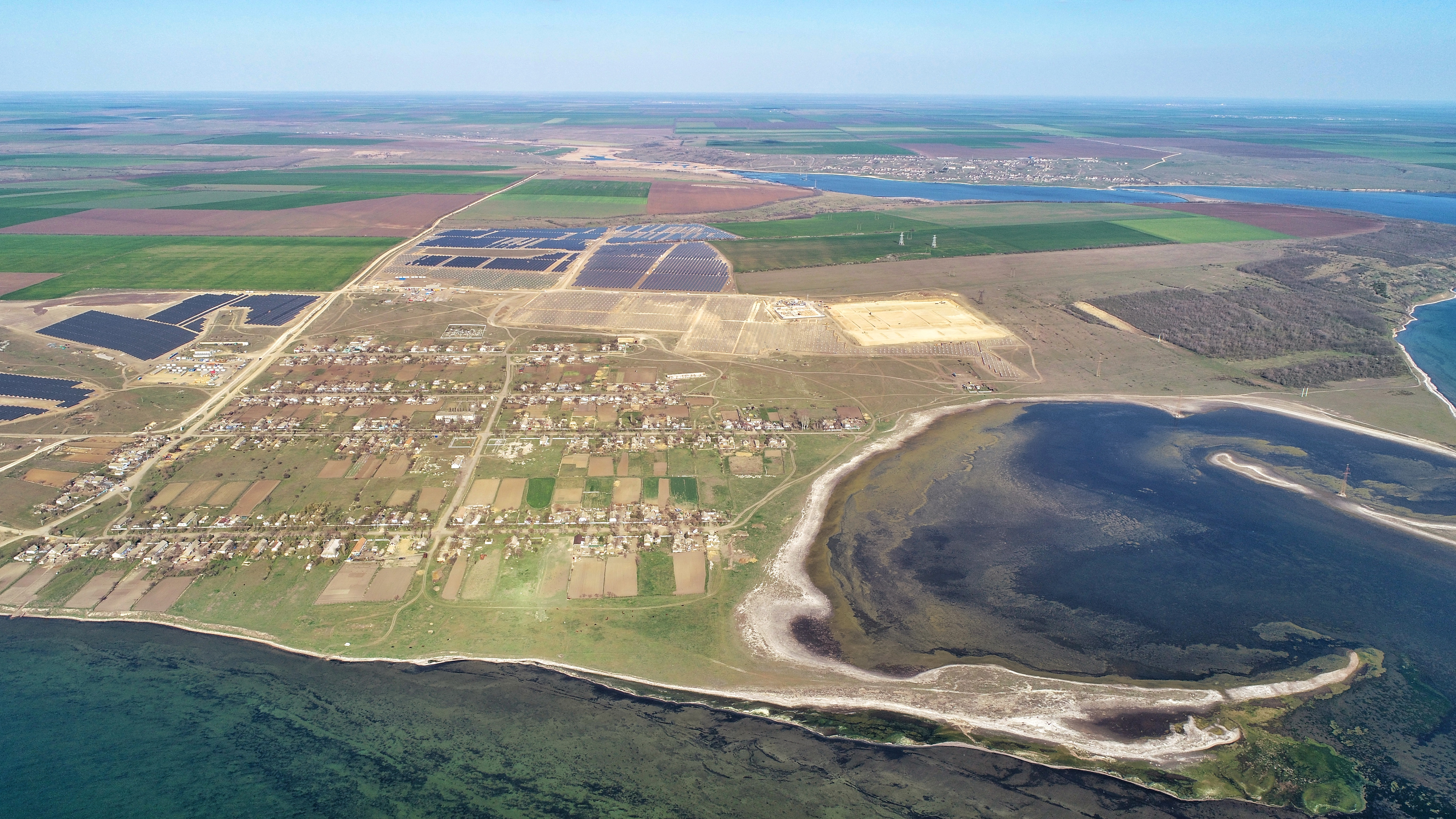 Вид на село Прогресівка зі сторони Тилігульского лиману. (висота - 500м.)